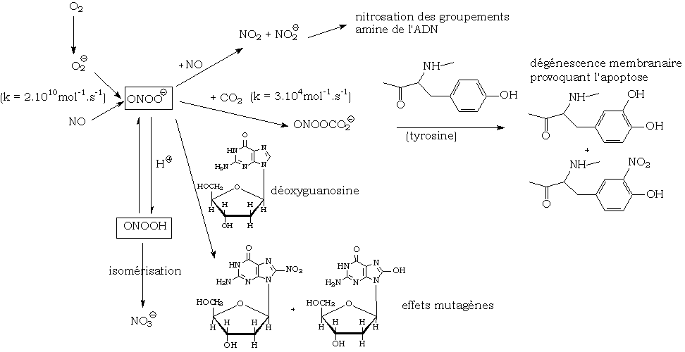 Réactivité des ions peroxynitrites et de l'acide peroxynitreux Auteur : Jengi Créé avec Chemwindows.